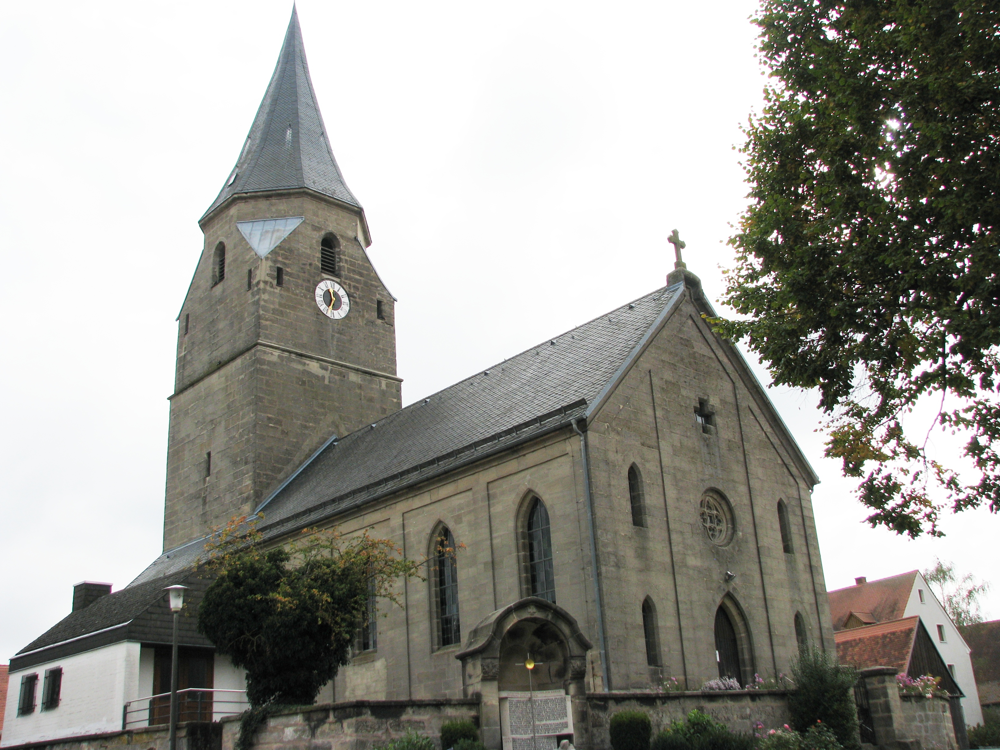 Laibstadt, Ortsteil von Heideck im mittelfränkischen Landkreis Roth, Kath. Pfarrkirche Mariä Himmelfahrt